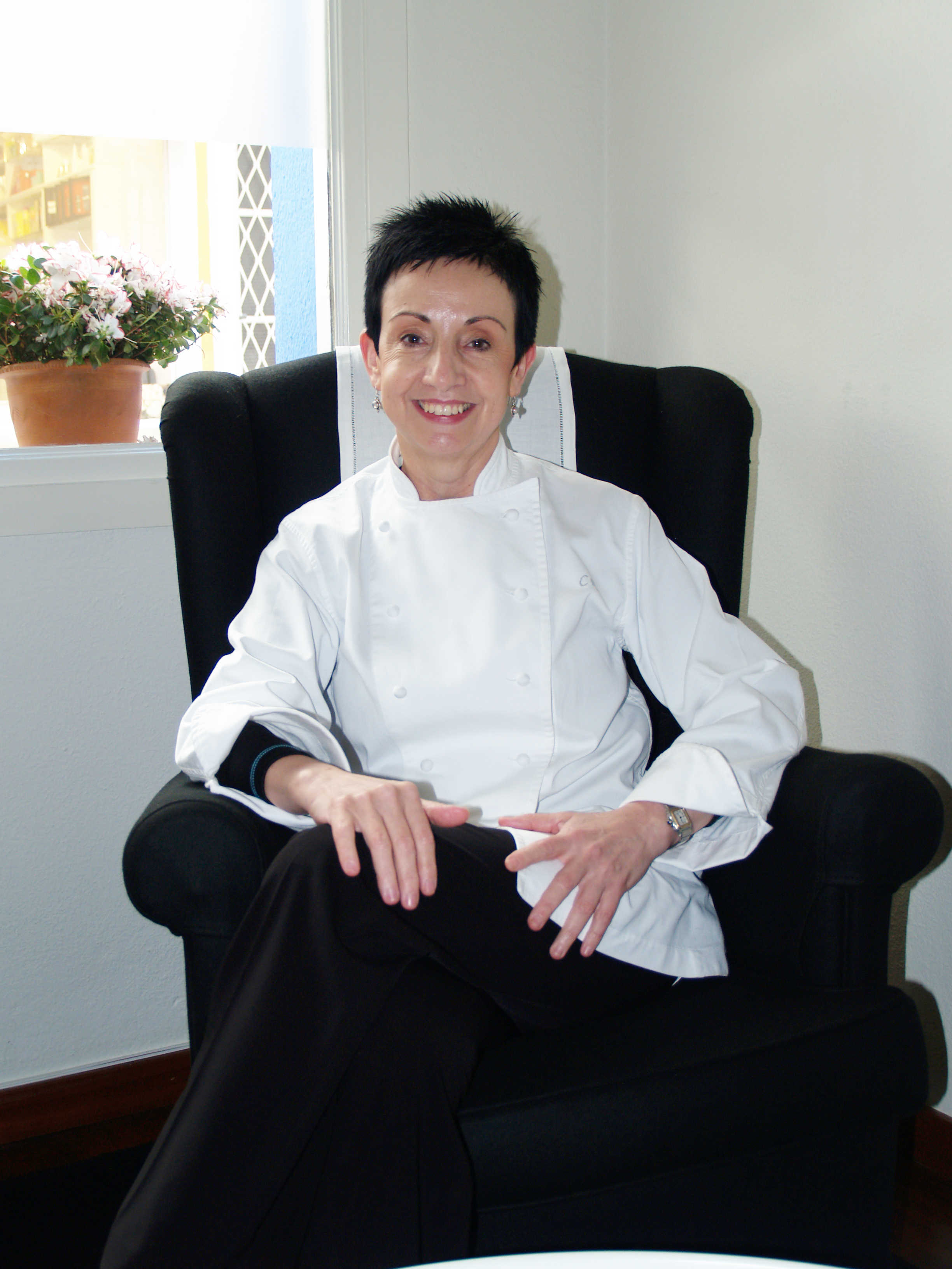 Carme Ruscalleda